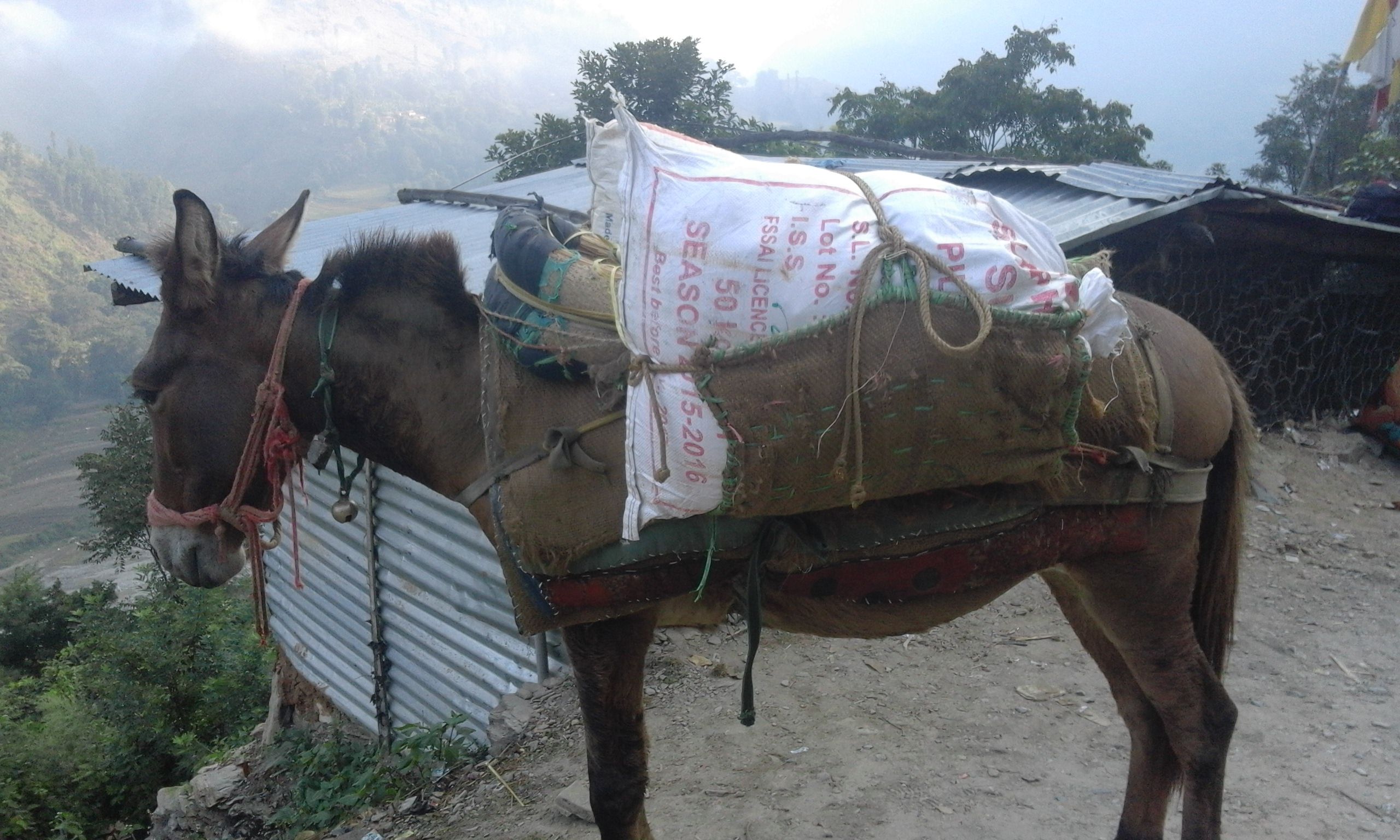 नेपाली: बैतडी जिल्ला र दार्चुला जिल्लाको सिमाना भारि बोक्दै गरेको खच्चर ।